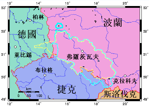 历史上西里西亚的地图：与现代中欧版图比较。来源是[1]。